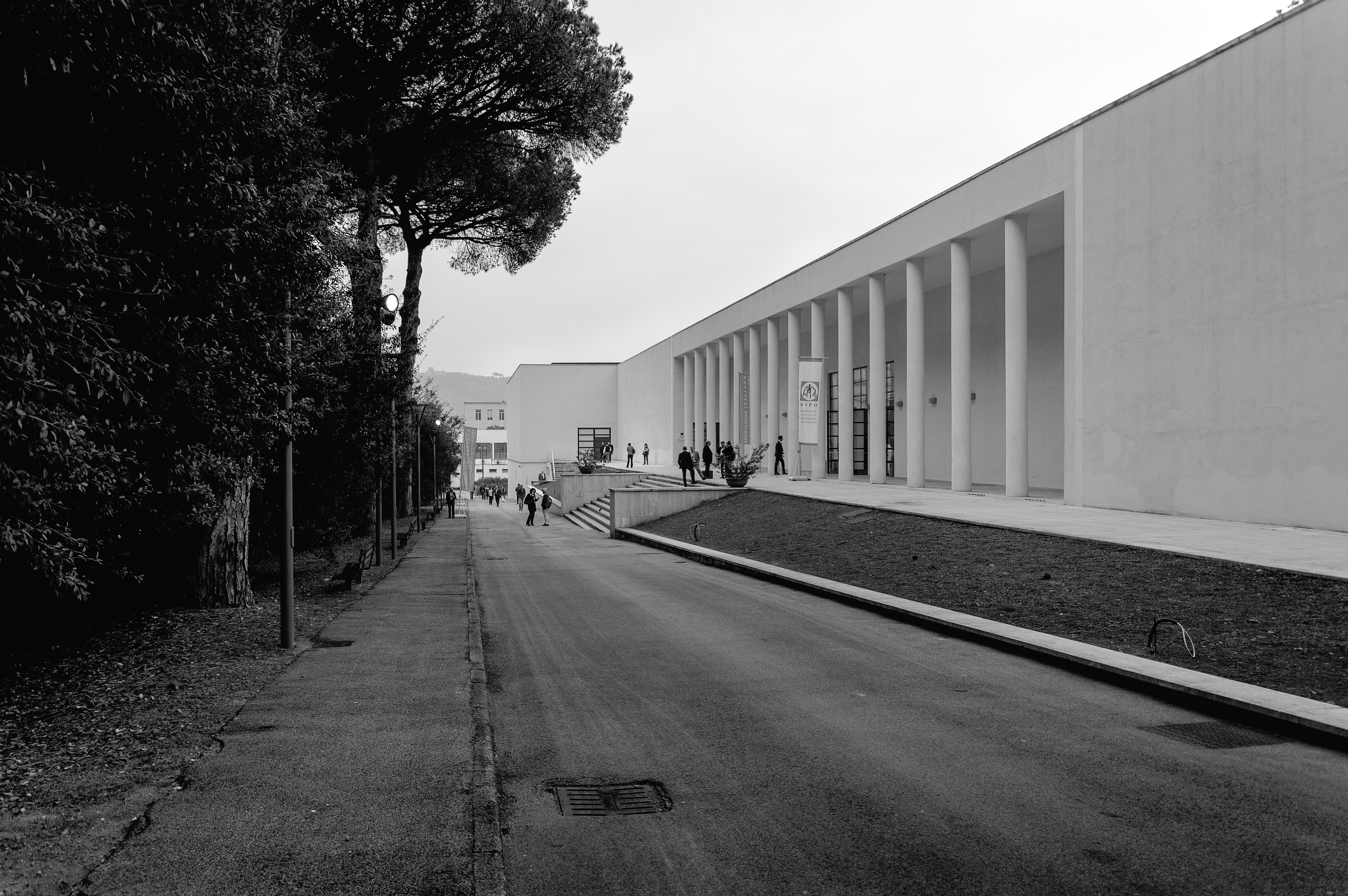 Prospetto del Centro Congressi alla Mostra d'Oltremare.